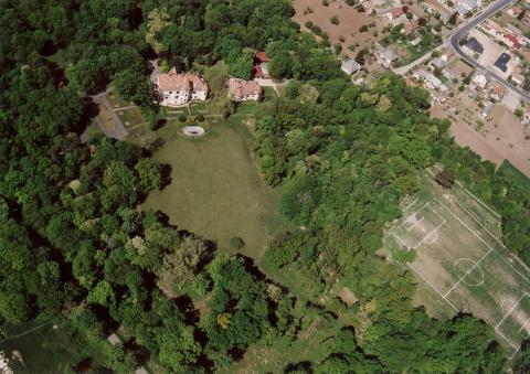 Sárszentmihály, Hungary, aerialphotography